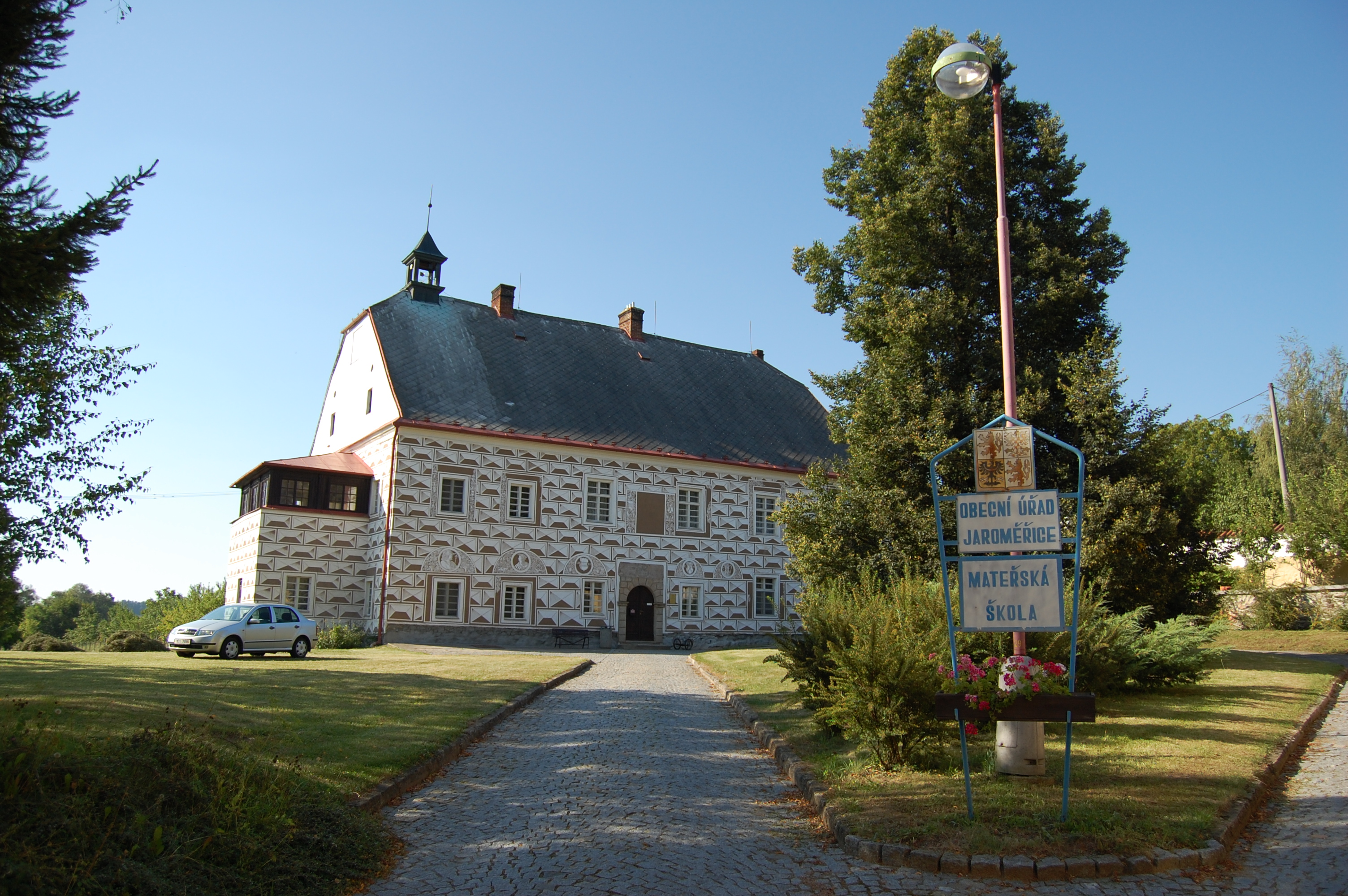 Zámek, Jaroměřice, okres Svitavy